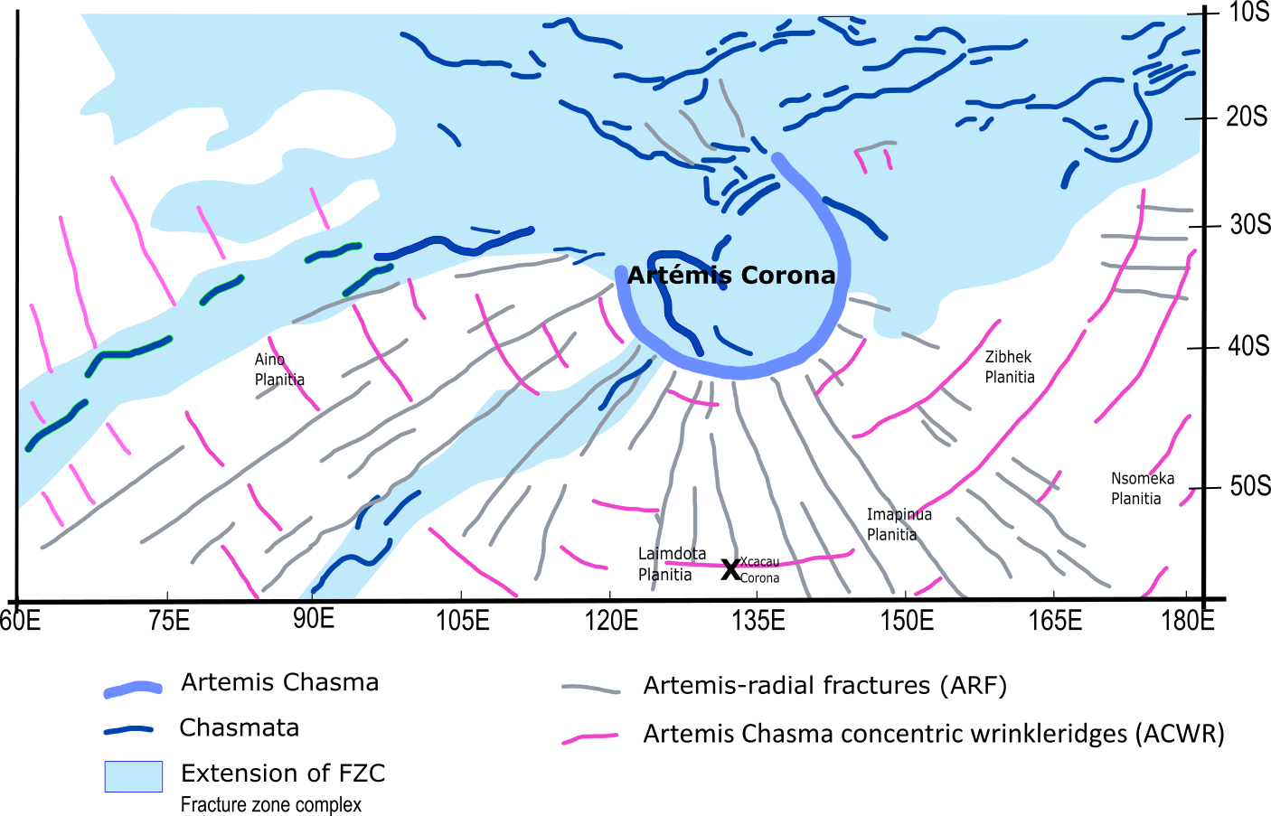 Extrait (simplifié) de la carte structurale détaillée à grande échelle régionale de la région Niobe-Aprodite (NAMA) de la planète Vénus. Étude réalisée par V. L. Hansen et I. López, publiée le 13 Juin 2018 (